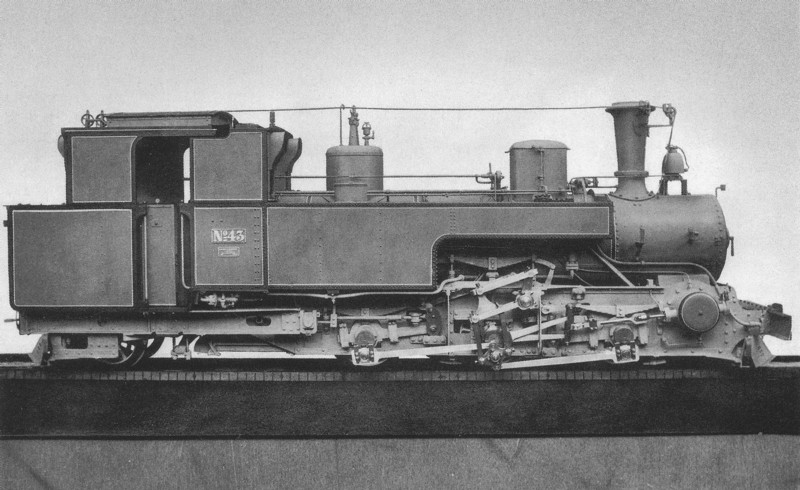 Kgl. Sächs. Sts. E. B. Gattung III K